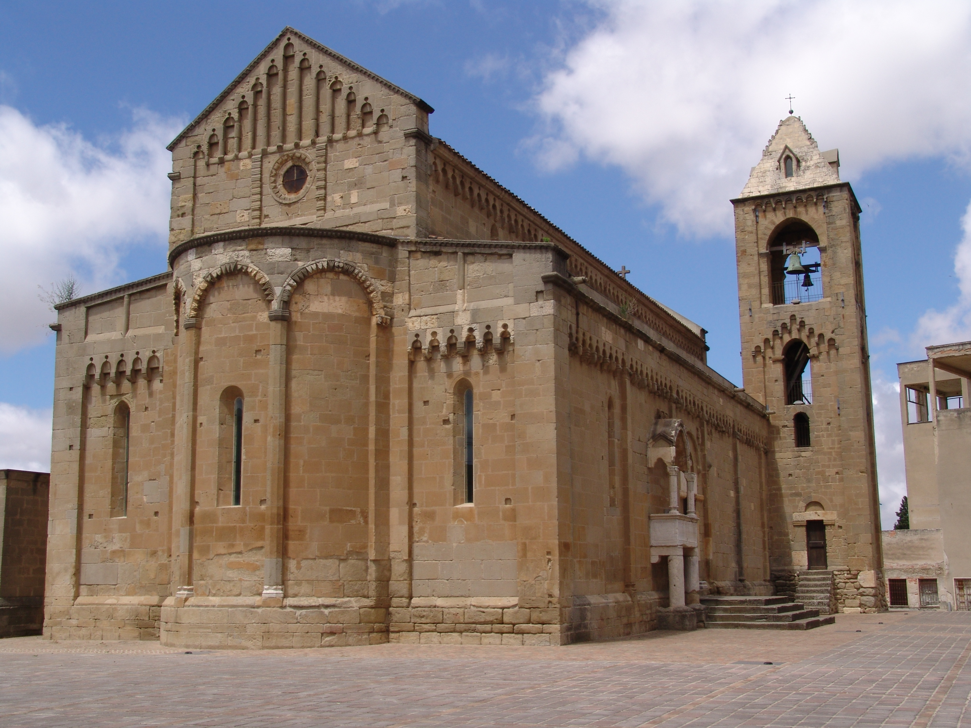 Cattedrale di S. Pantaleo XII- XIII secolo. Facciata posteriore ed il fianco sinistro This is a photo of a monument which is part of cultural heritage of Italy.